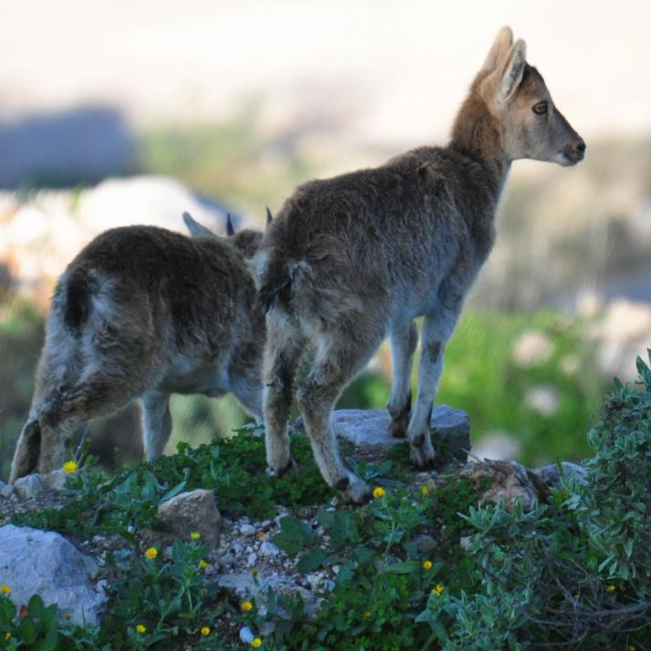 Jovenes Cábras Montesas en Sierra de Esparteros (2012)